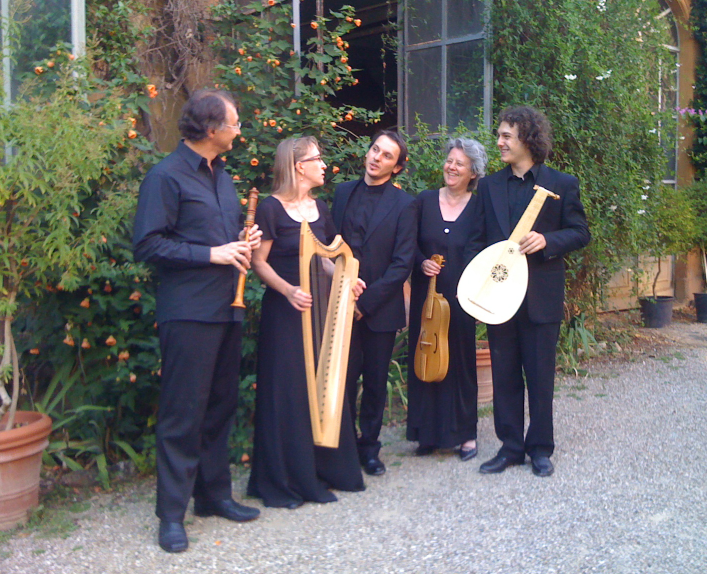 Modo Antiquo Barockorchester